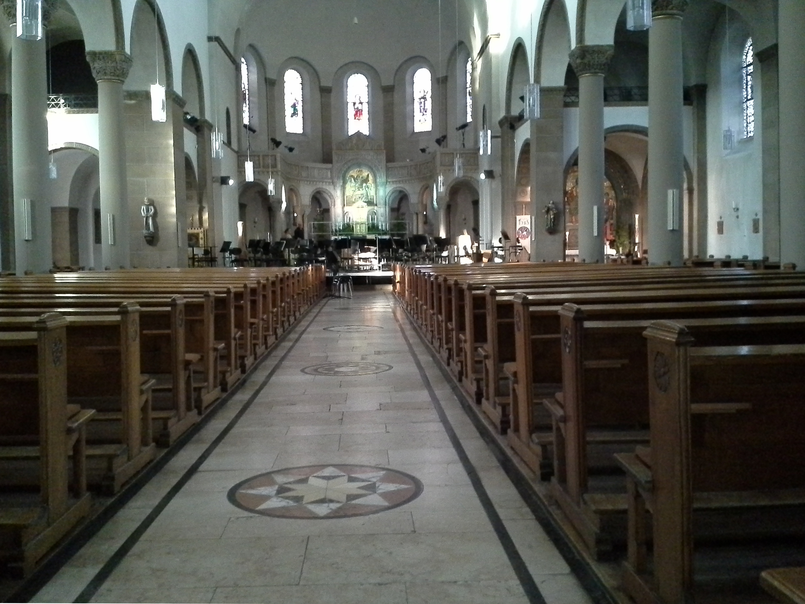 Trier St. Martin, Innen